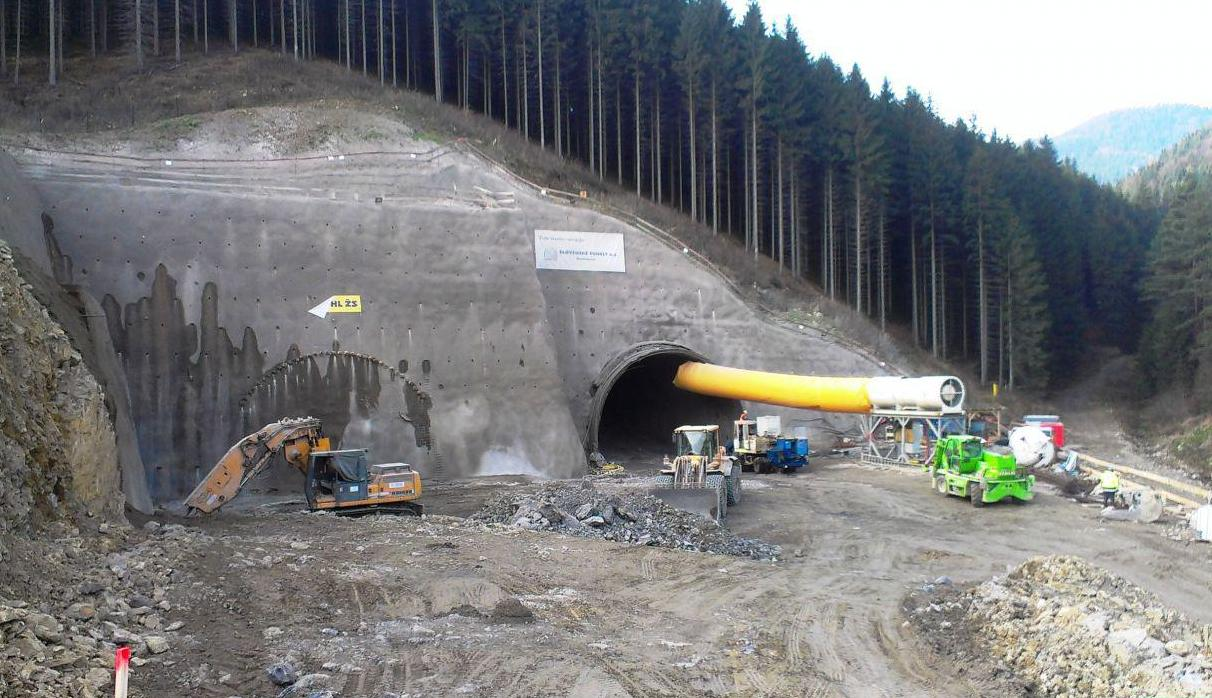 cebrat